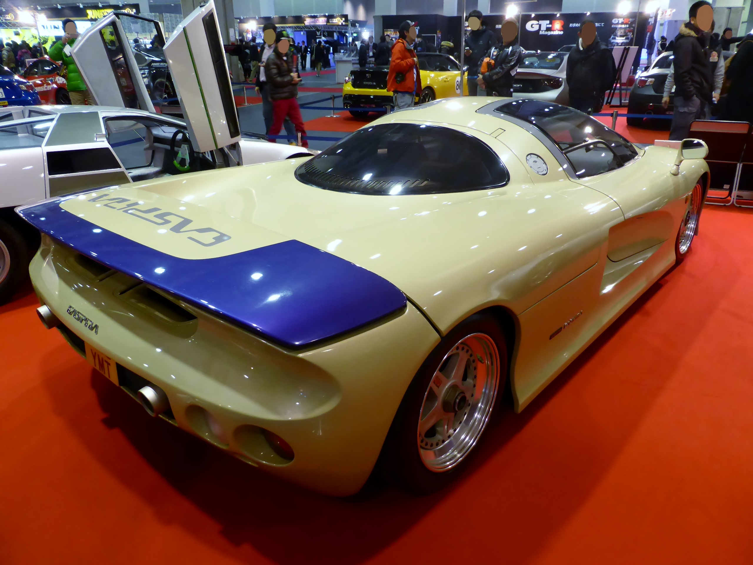 大阪オートメッセ2014においてジオット・キャスピタを撮影。